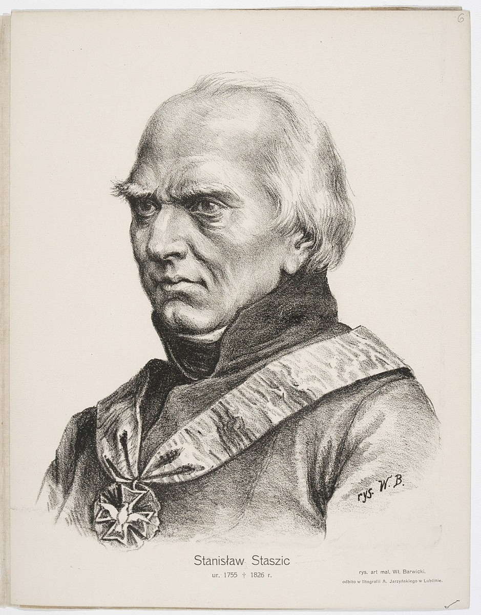 Stanisław Staszic portrait from CBN Polona